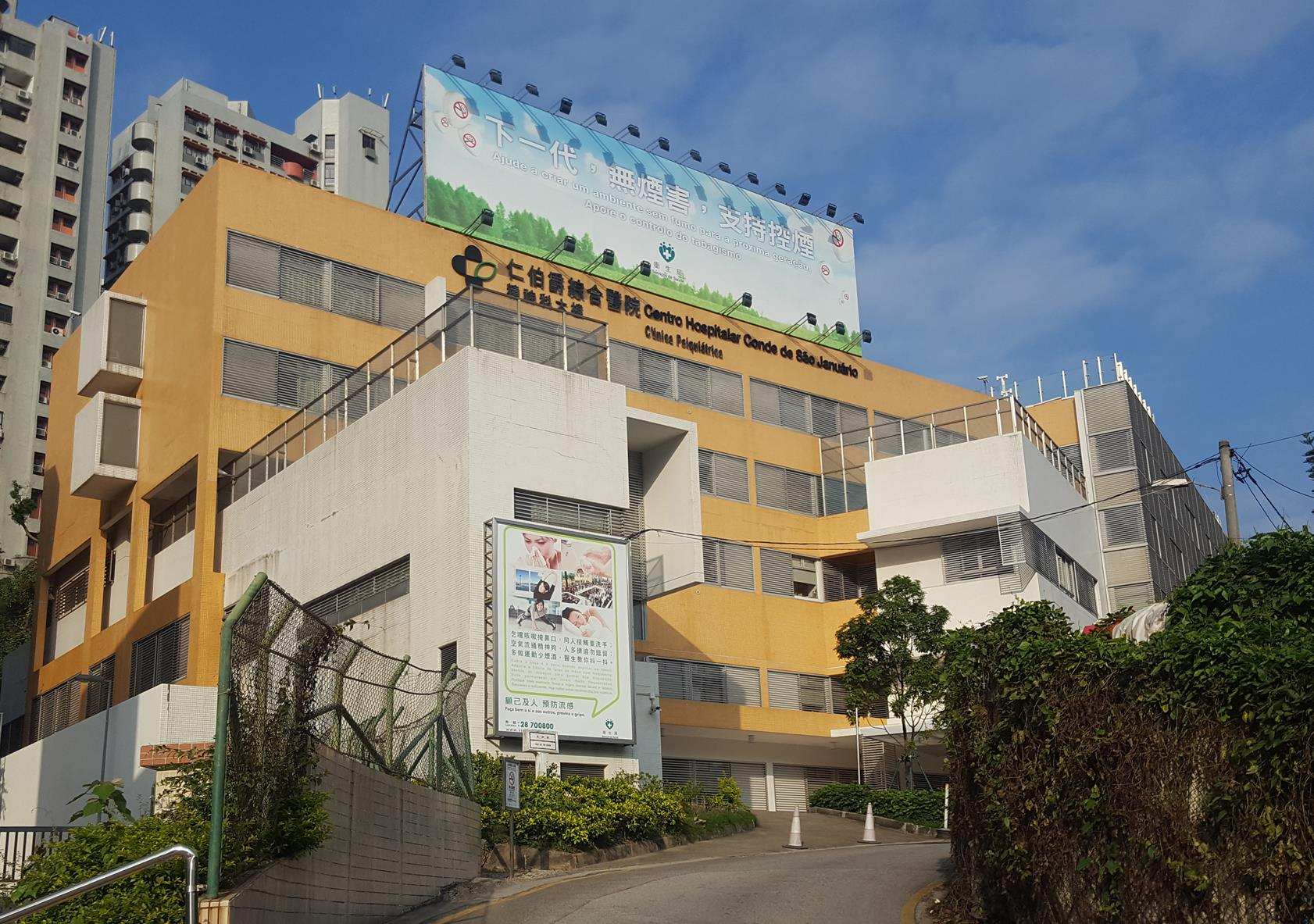 仁伯爵綜合醫院精神科大樓